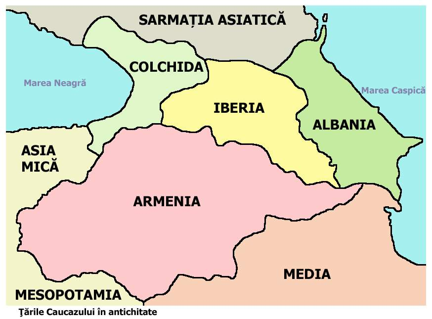 Caucazul în atichitate